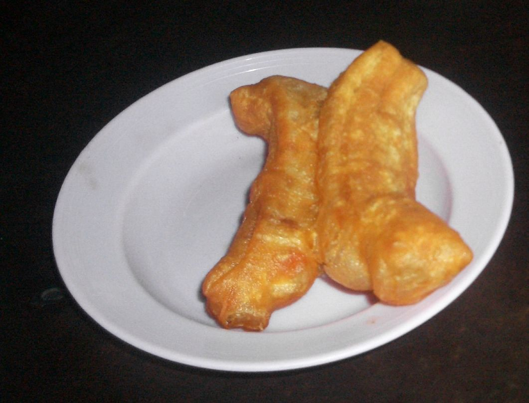 pathongko (